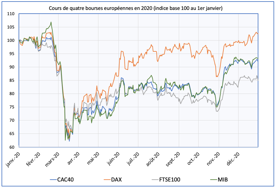 Cours des bourses de Paris, Francfort, Londres et Milan depuis le 1er janvier 2020